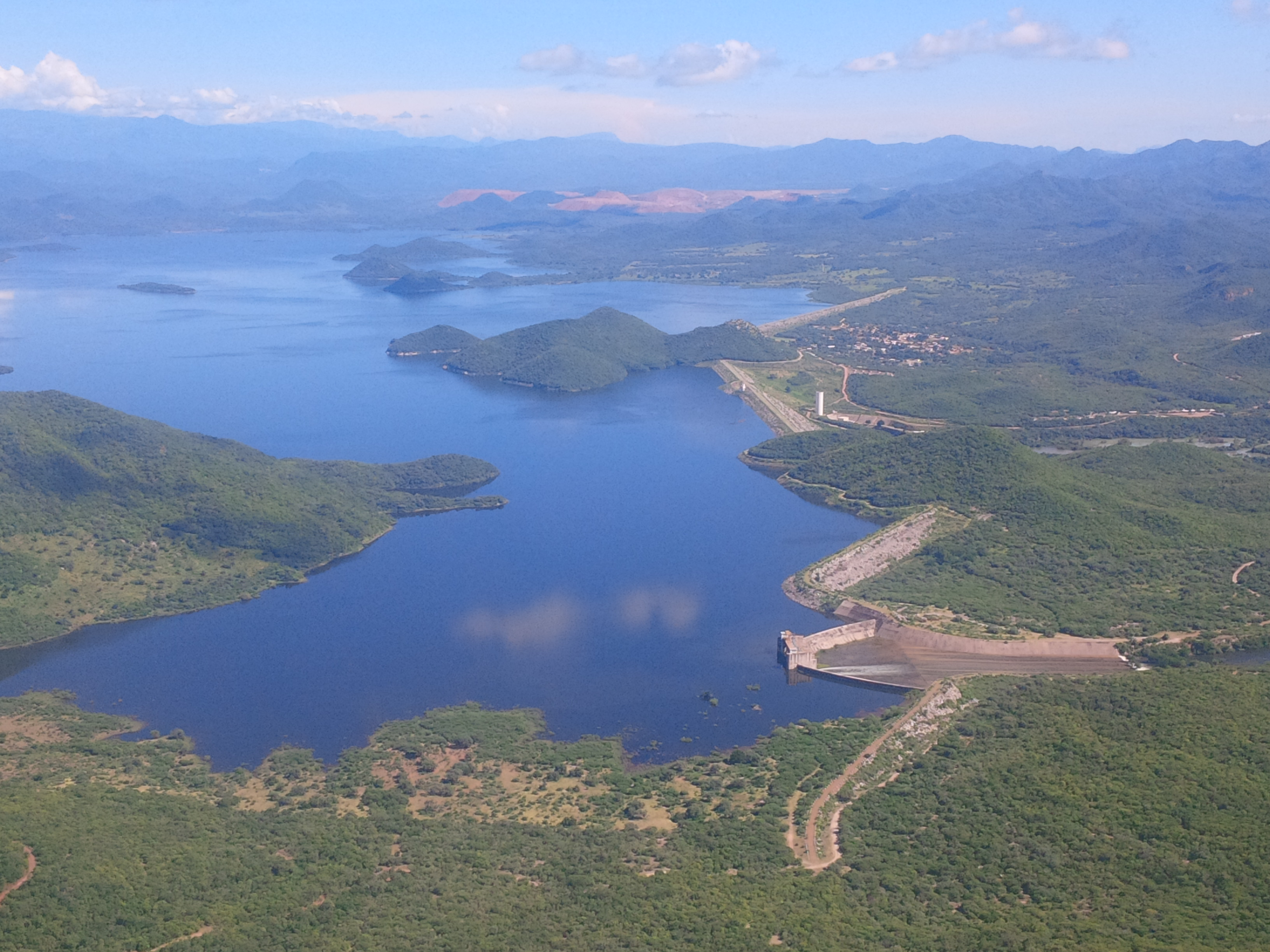 La Presa Adolfo Ruiz Cortines o Mocúzari cumple 60 años de servicio A 60 años de su creación, la presa Adolfo Ruiz Cortines o Mocúzari es una de las más activas, productivas y salvaguardadas de México. Entró en operación en 1955 en el municipio de Álamos, Sonora, para satisfacer las necesidades de agua de los agricultores y de los centros urbanos en los municipios de Navojoa, Etchojoa y Huatabampo, y permitió resolver problemas de inundaciones al servir como control de avenidas. Te invitamos a conocerla en este video.